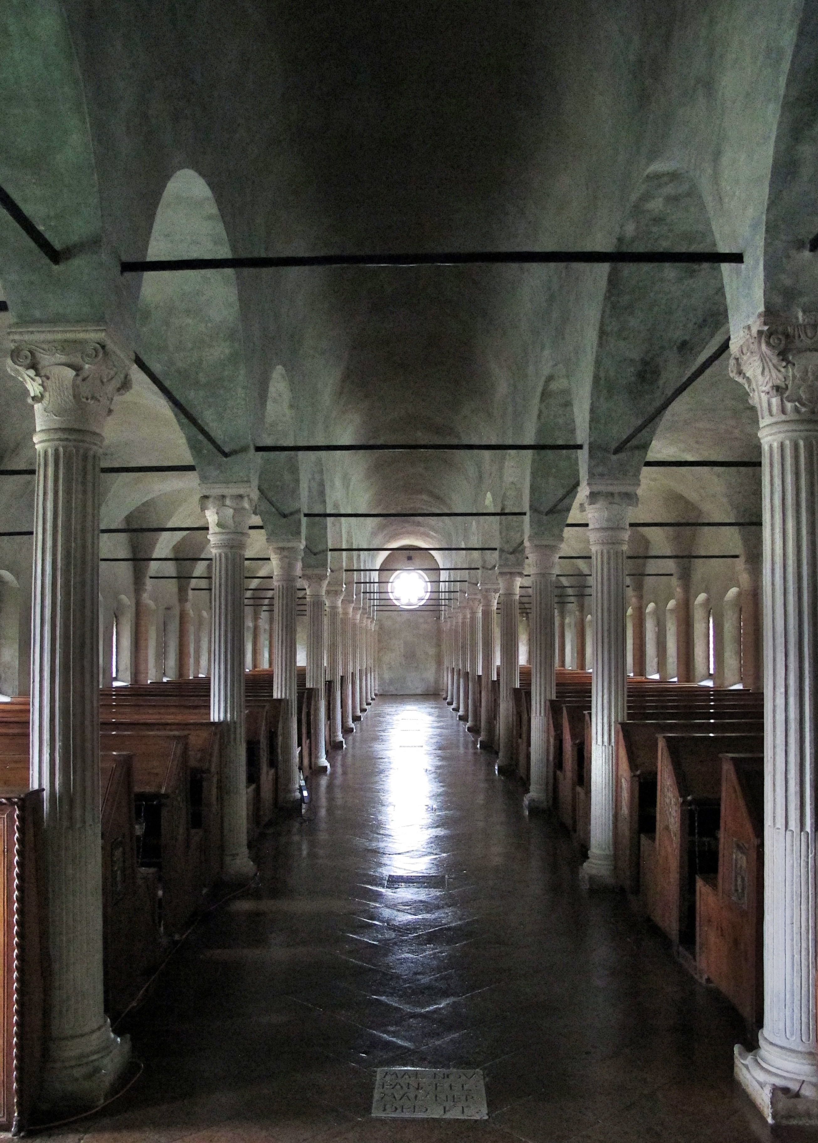 Biblioteca Malatestiana - MIBAC This is a photo of a monument which is part of cultural heritage of Italy.